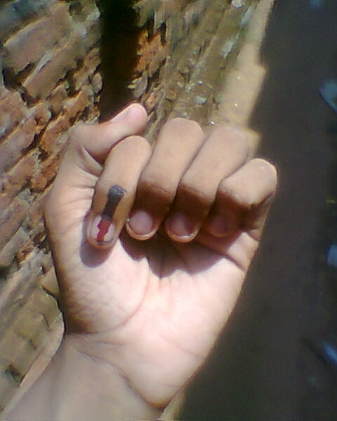 Ink marking after Vote (India)